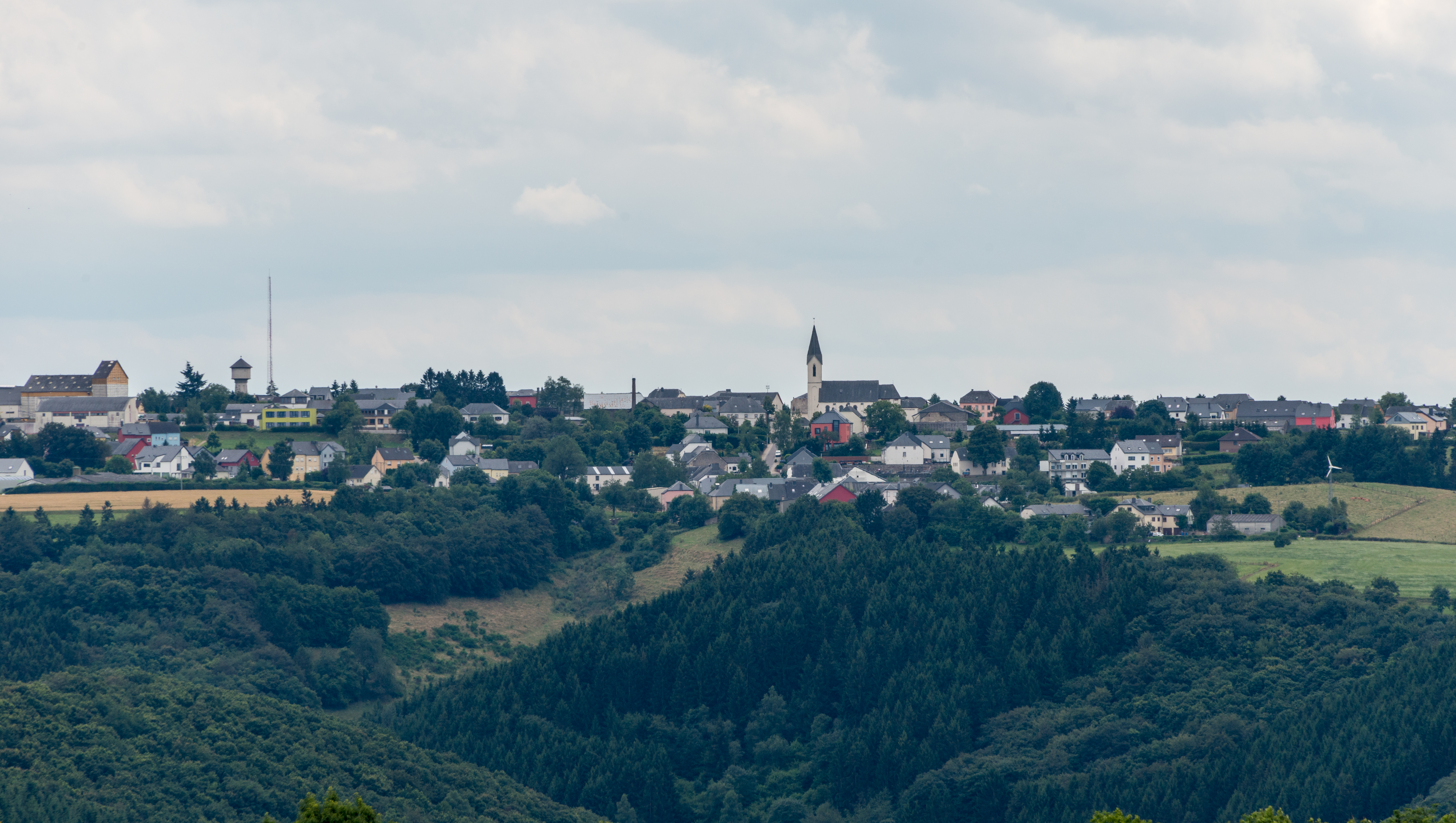 Vue op Heischent vu Géisdref, 'Op der Minn', bei der Weekapell .